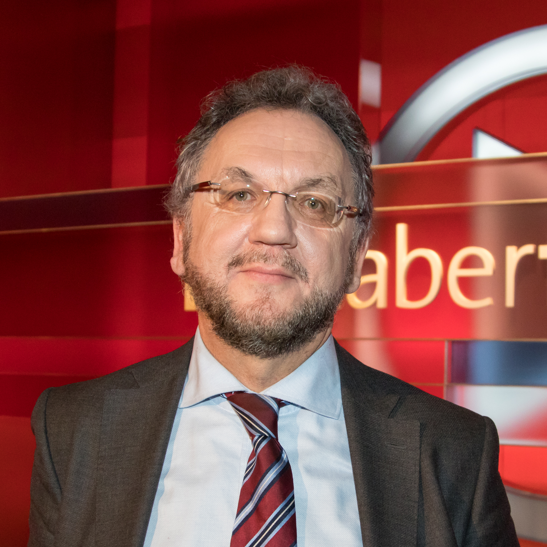 Heribert Prantl in der WDR-Sendung "hart aber fair" am 9. Januar 2017